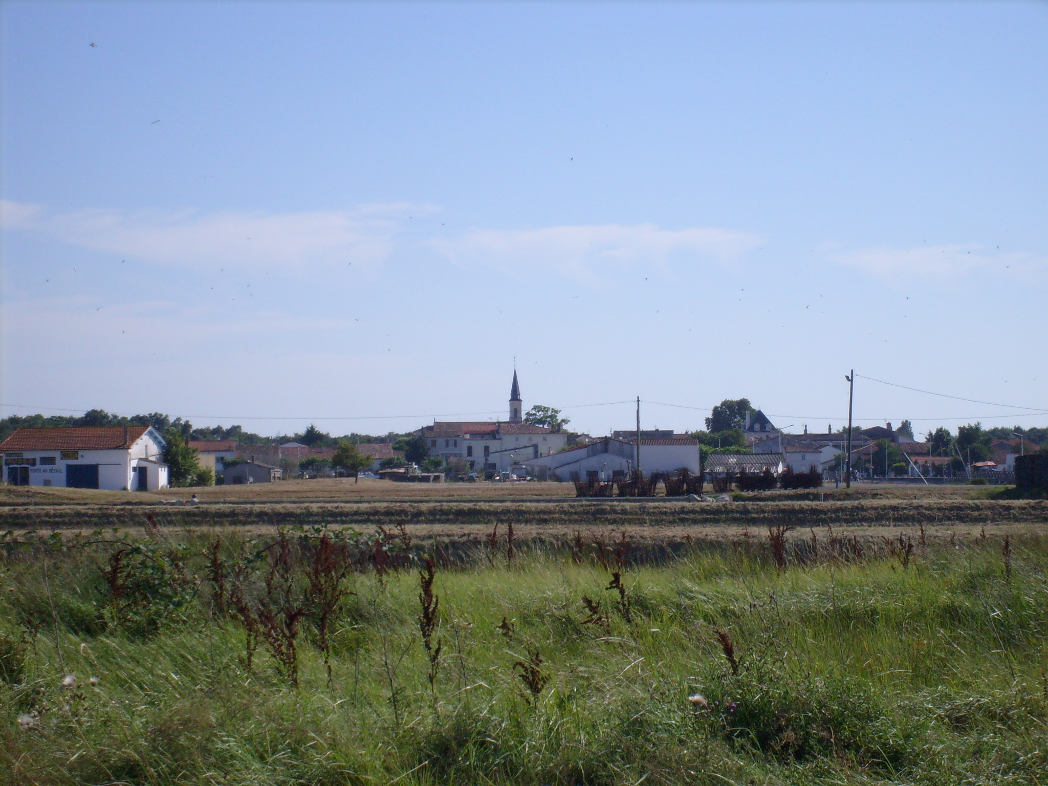 Le village de l'éguille, en Charente-Maritime.